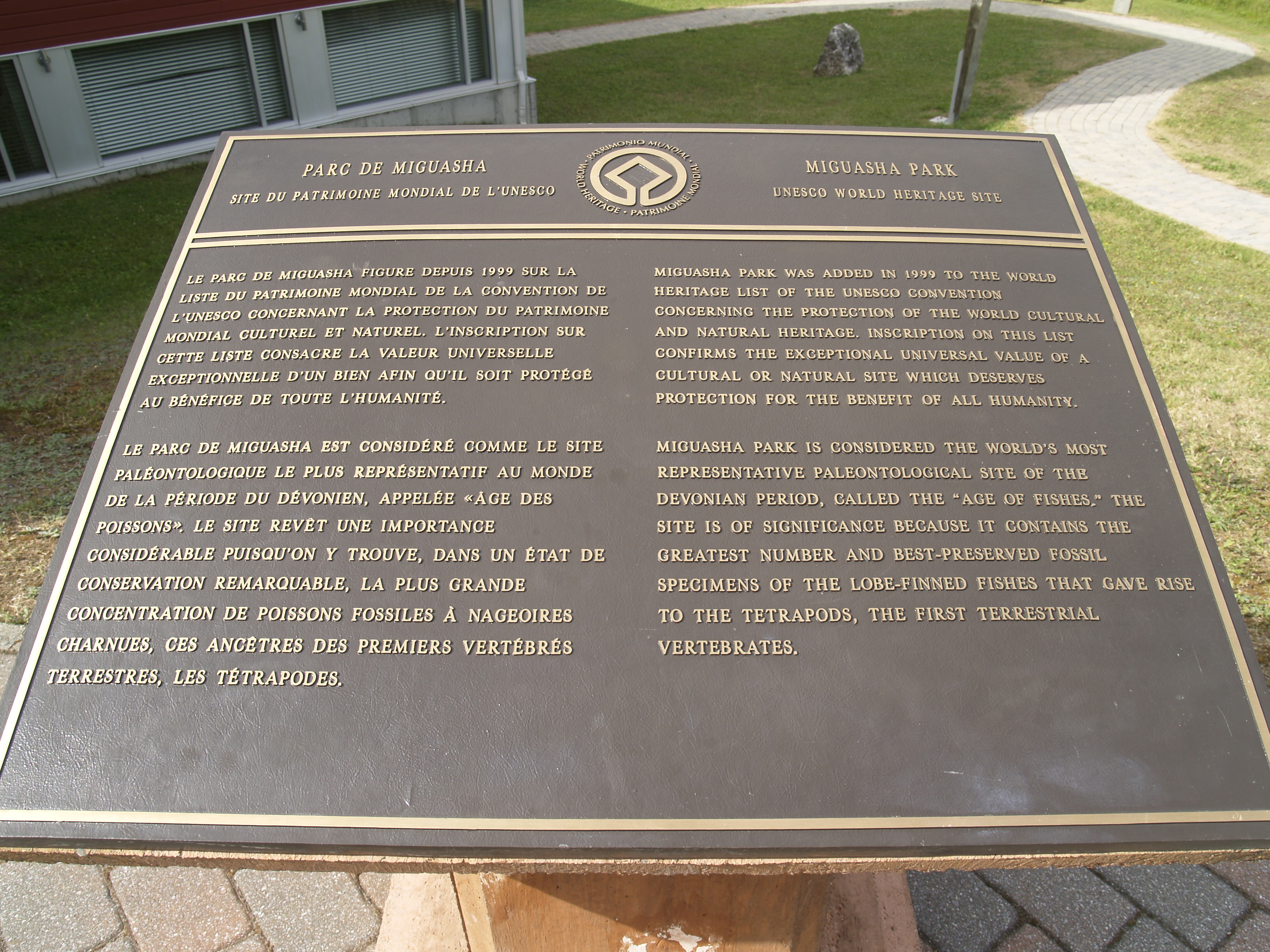 Entrada a Miguasha National Park